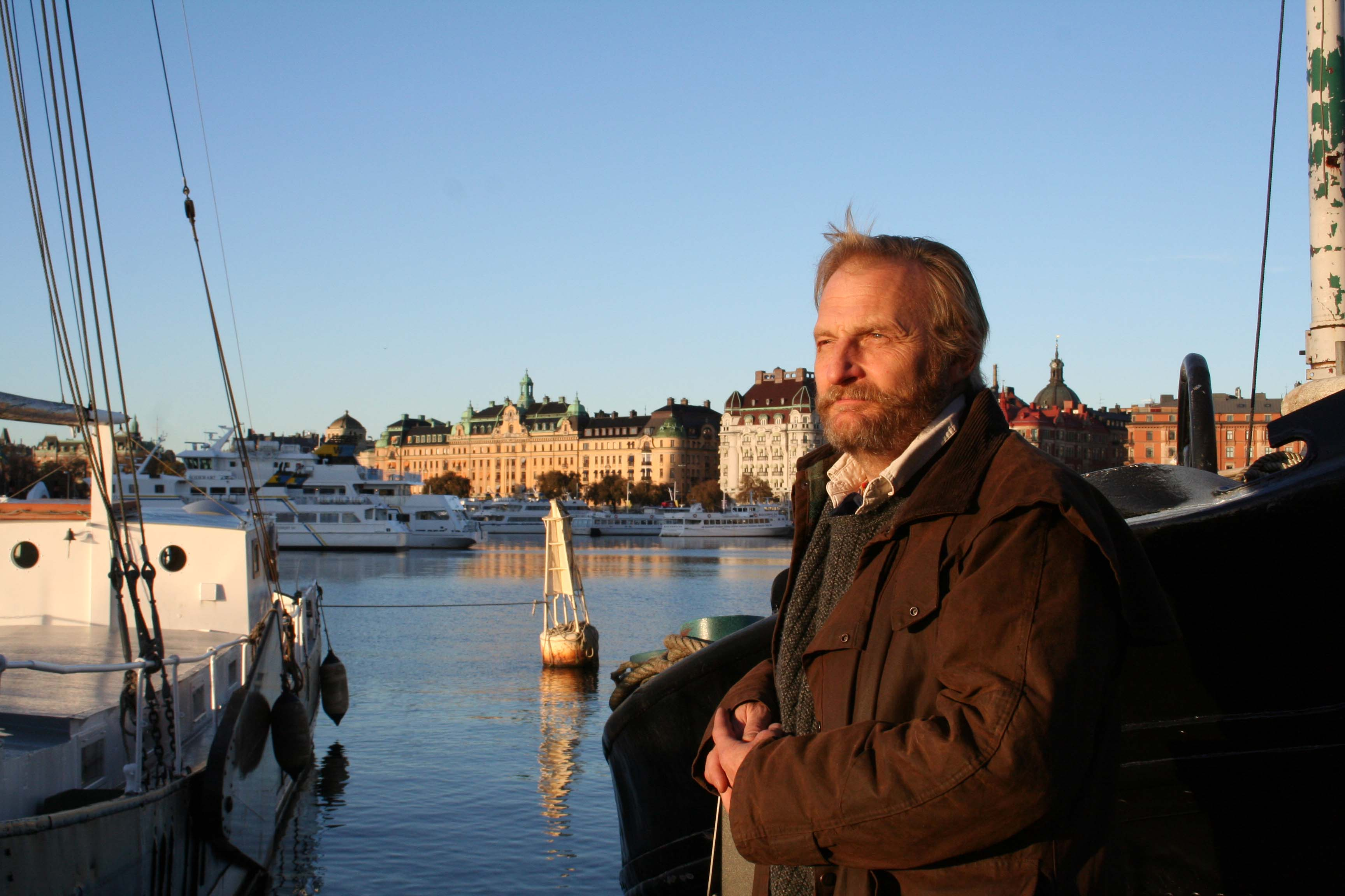 Bild på författaren Birger Sjöberg (född 1953)